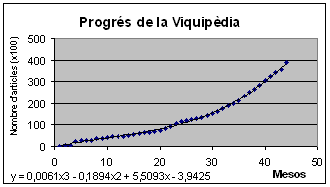 Gràfic de l'evolució de la Viquipèdia